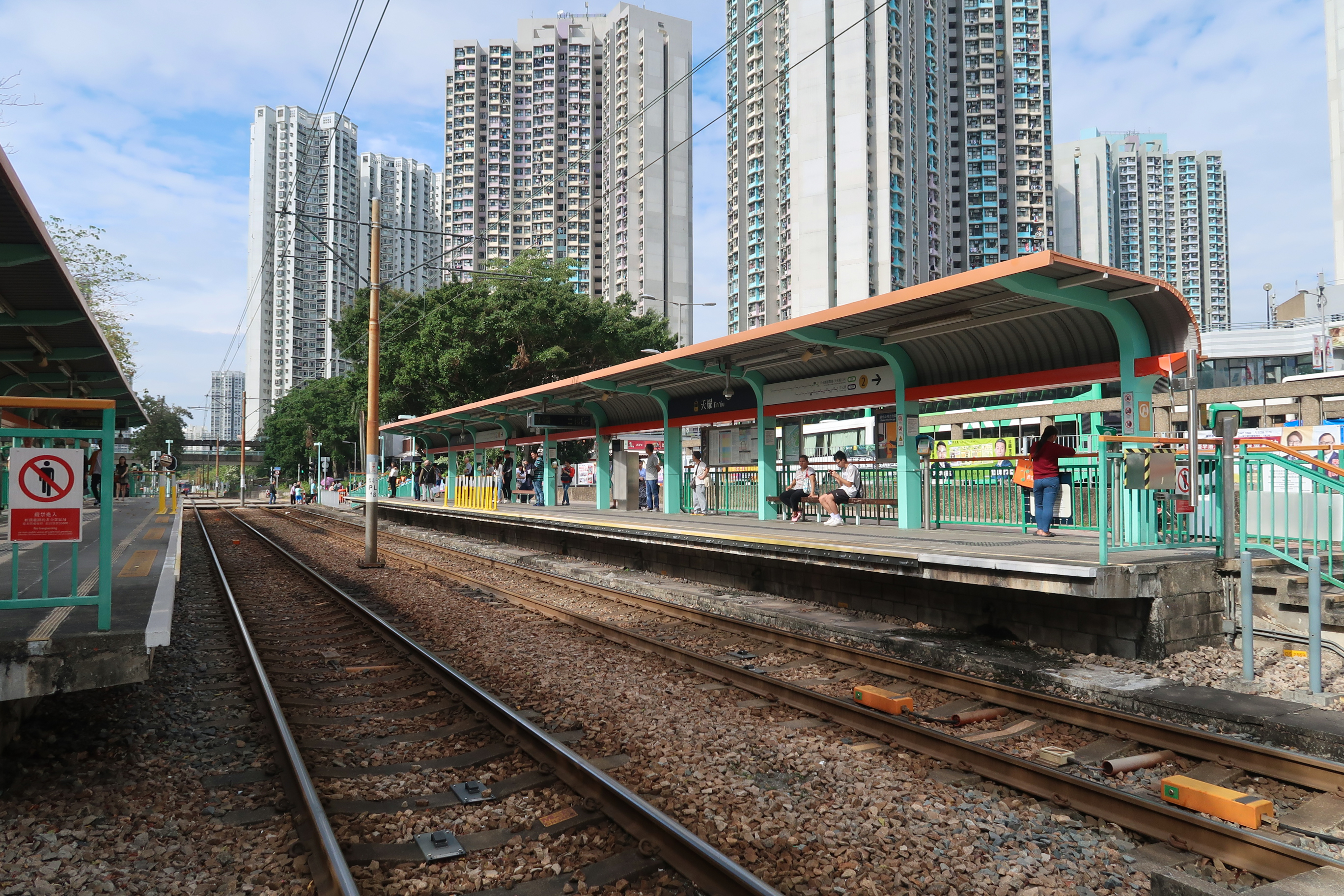 Tin Yiu Stop